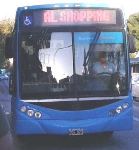 Interno de la línea 113, con uno de los destinos en su cartelera: "Al shopping".